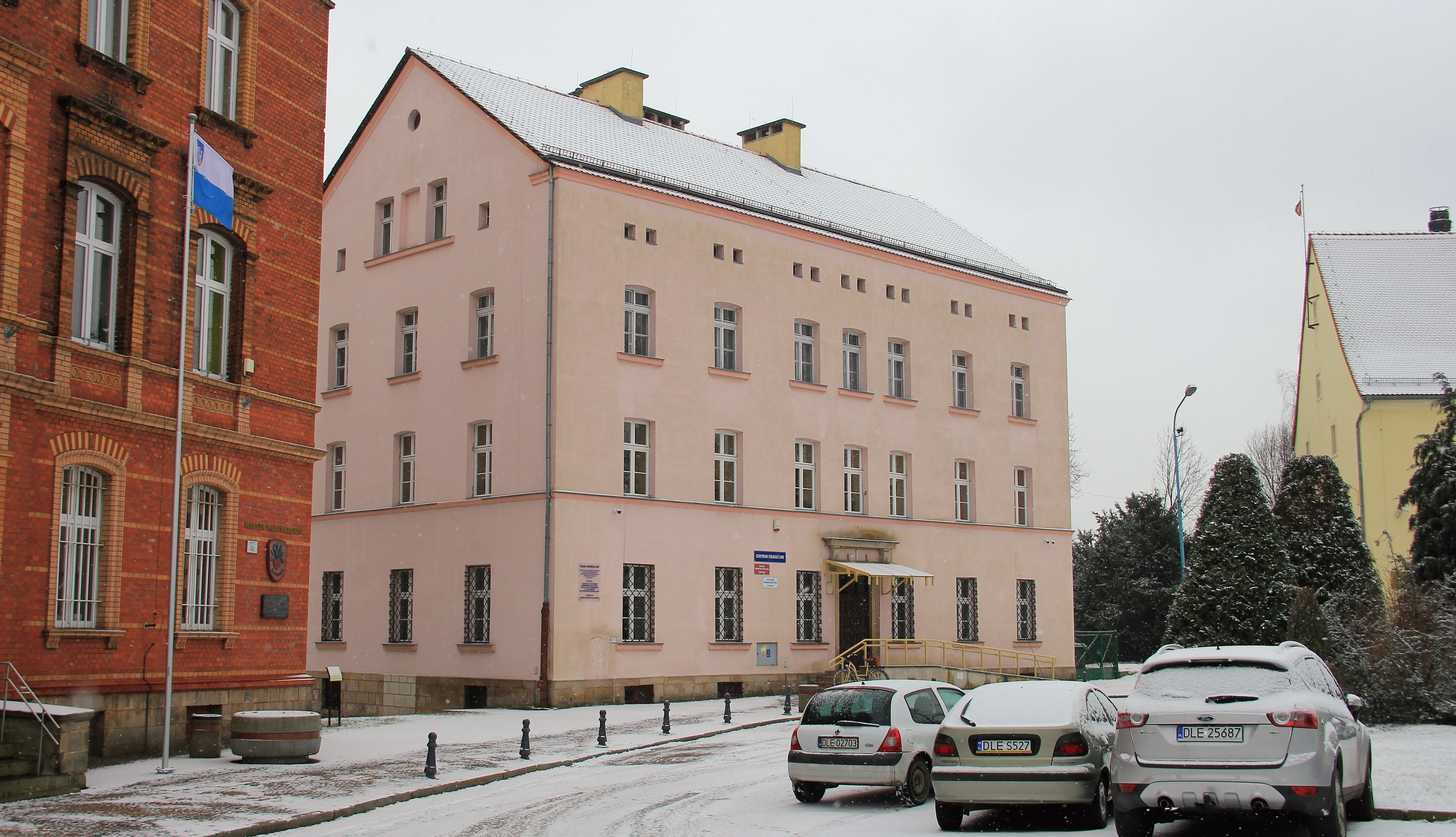 Budynek Centrum Edukacyjnego w Chojnowie